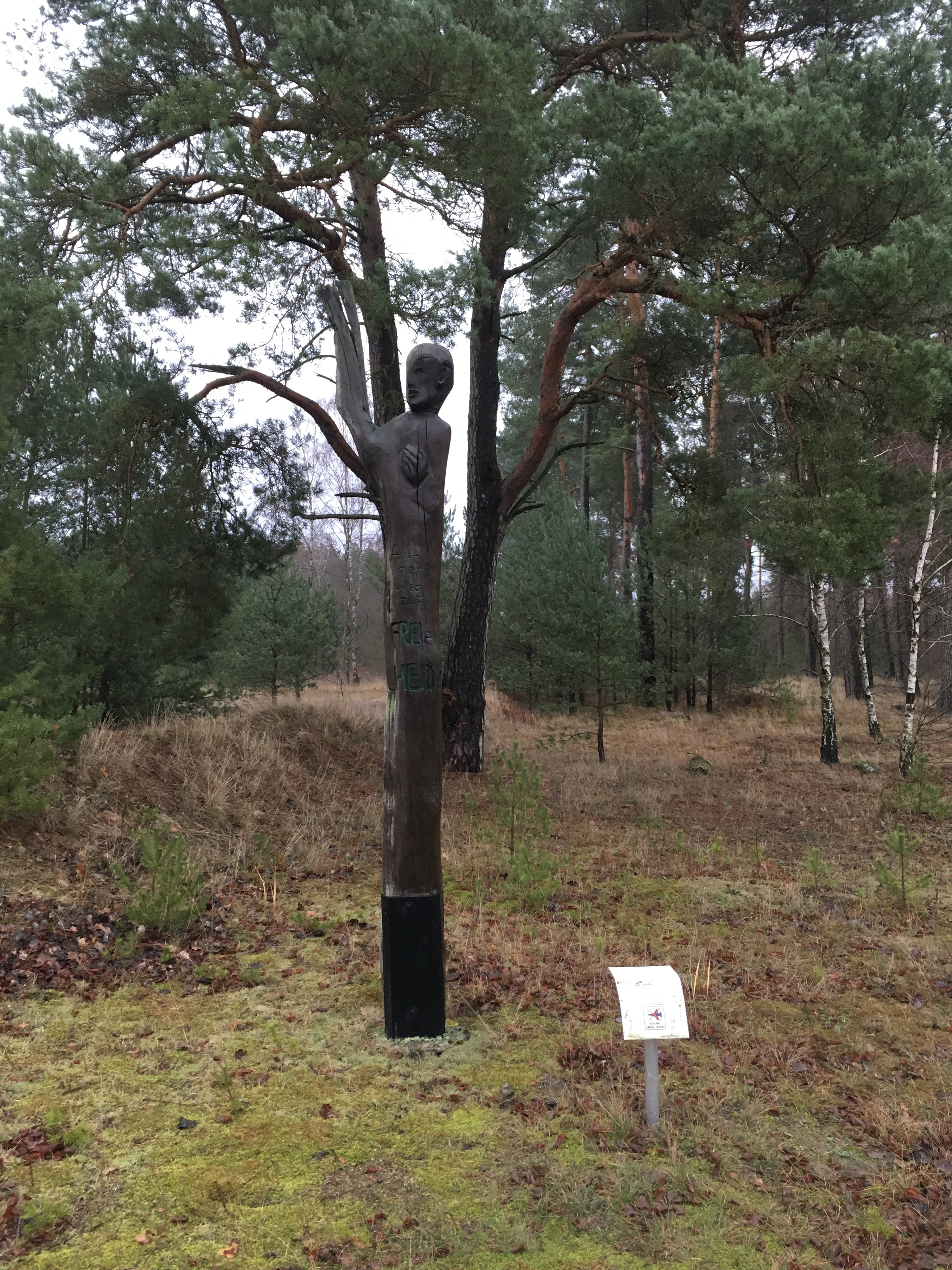 Der Dranser See ist ein Gewässer in Dranse, einem Ortsteil der Stadt Wittstock/Dosse im Landkreis Ostprignitz-Ruppin im Land Brandenburg